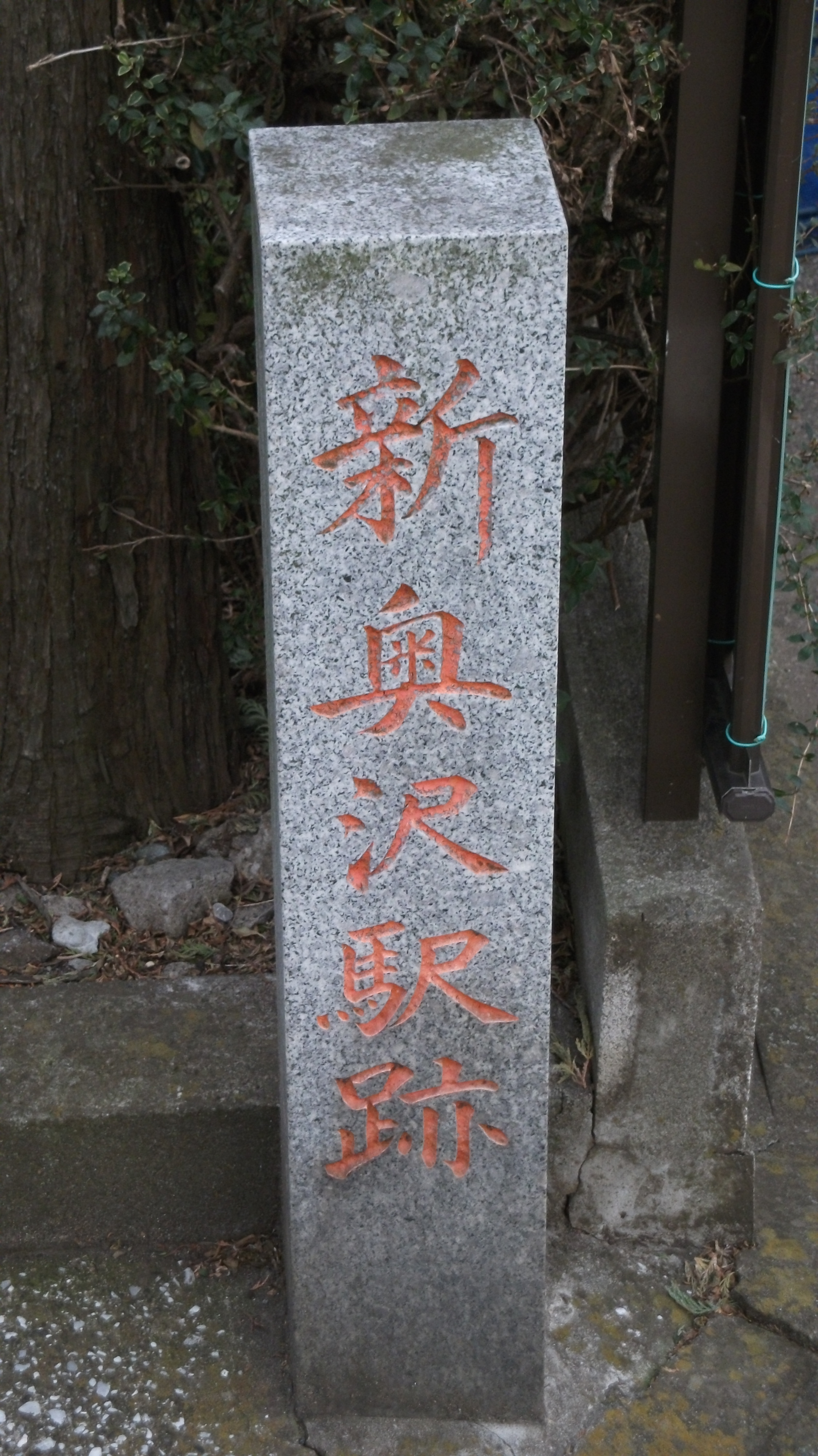 目黒蒲田電鉄新奥沢線新奥沢駅跡の石碑